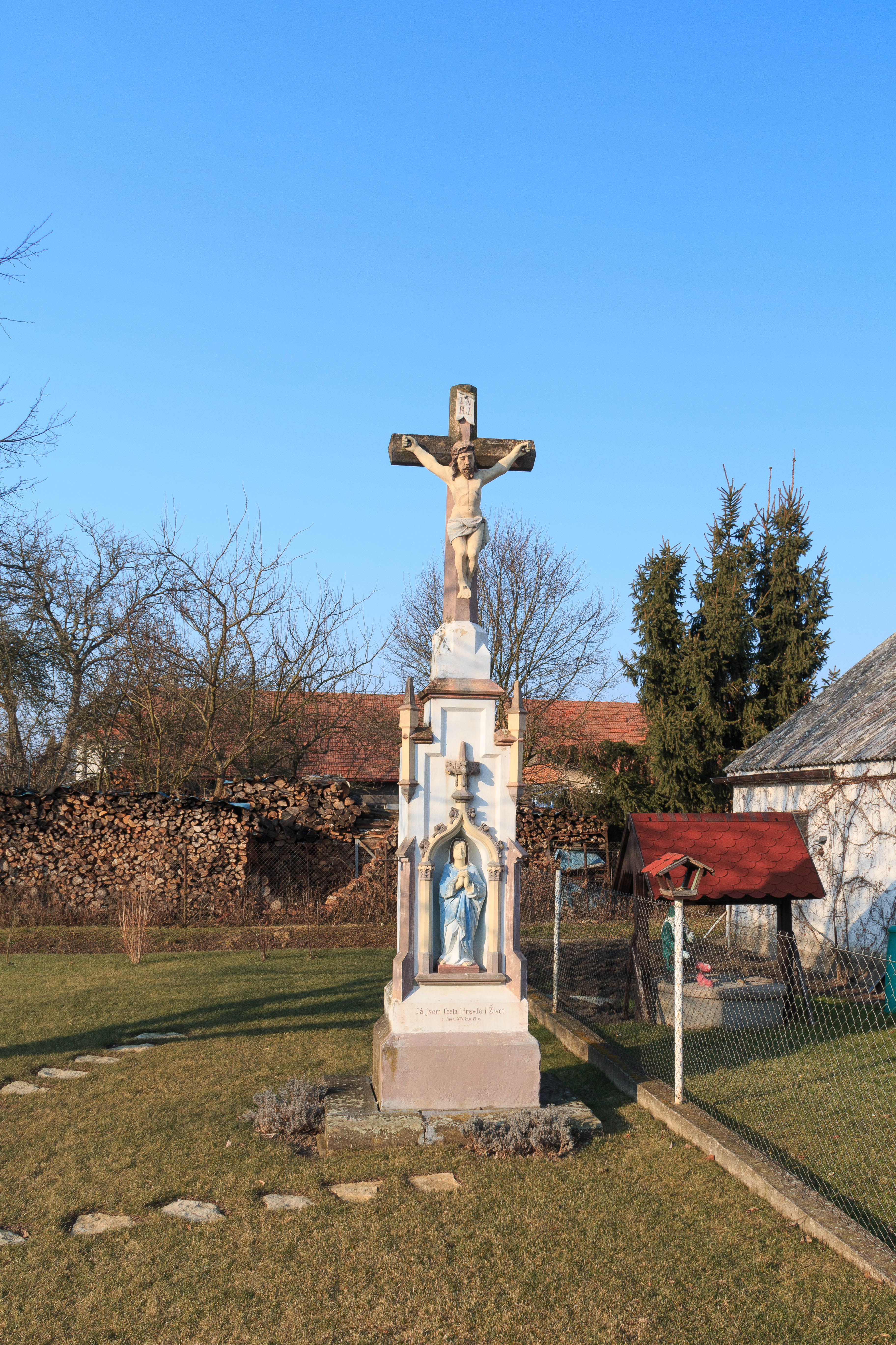 Vlčí Habřina kříž